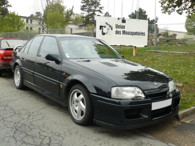 Français cadien: Montlhery avril 2012